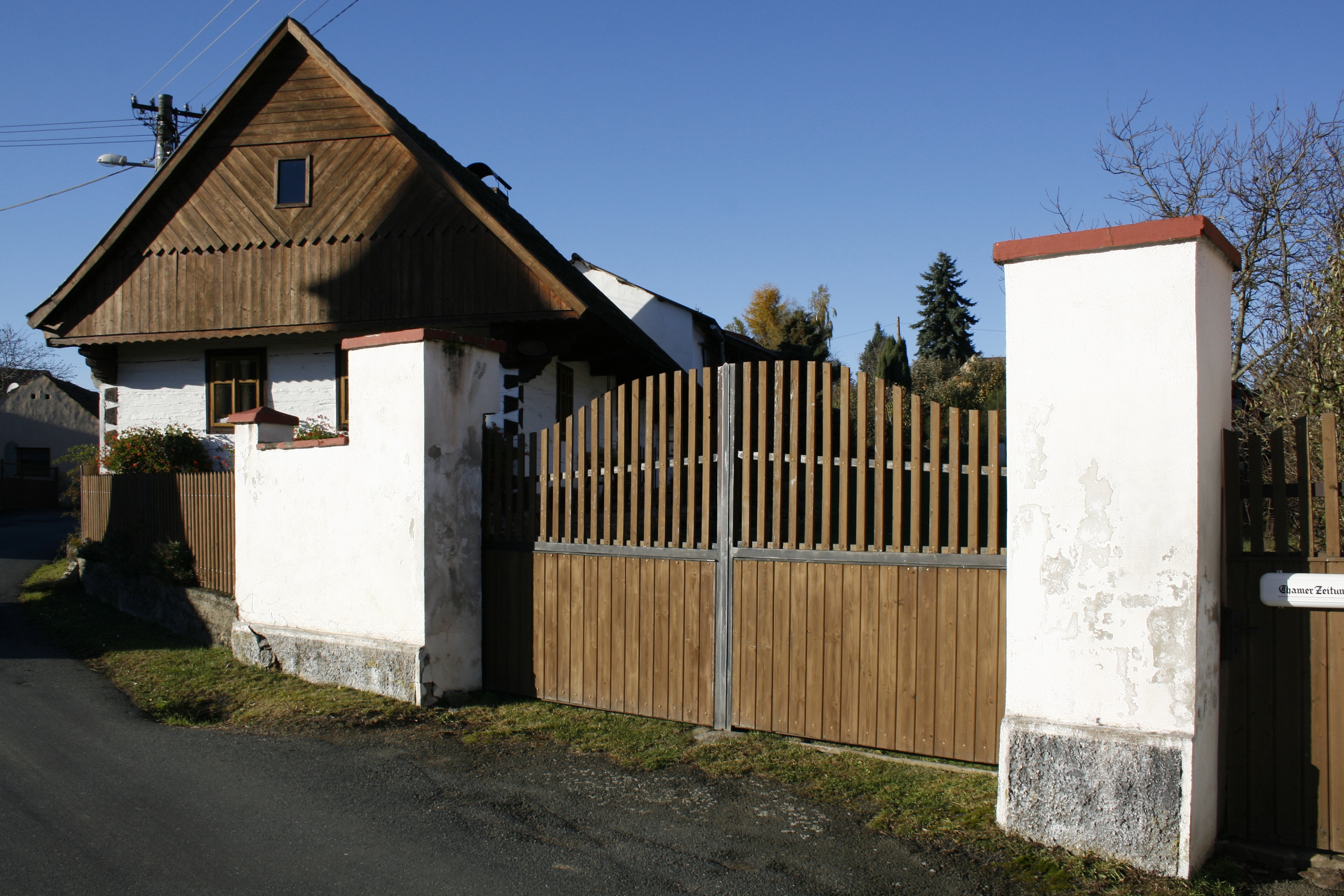 Kanice, okres Domažlice